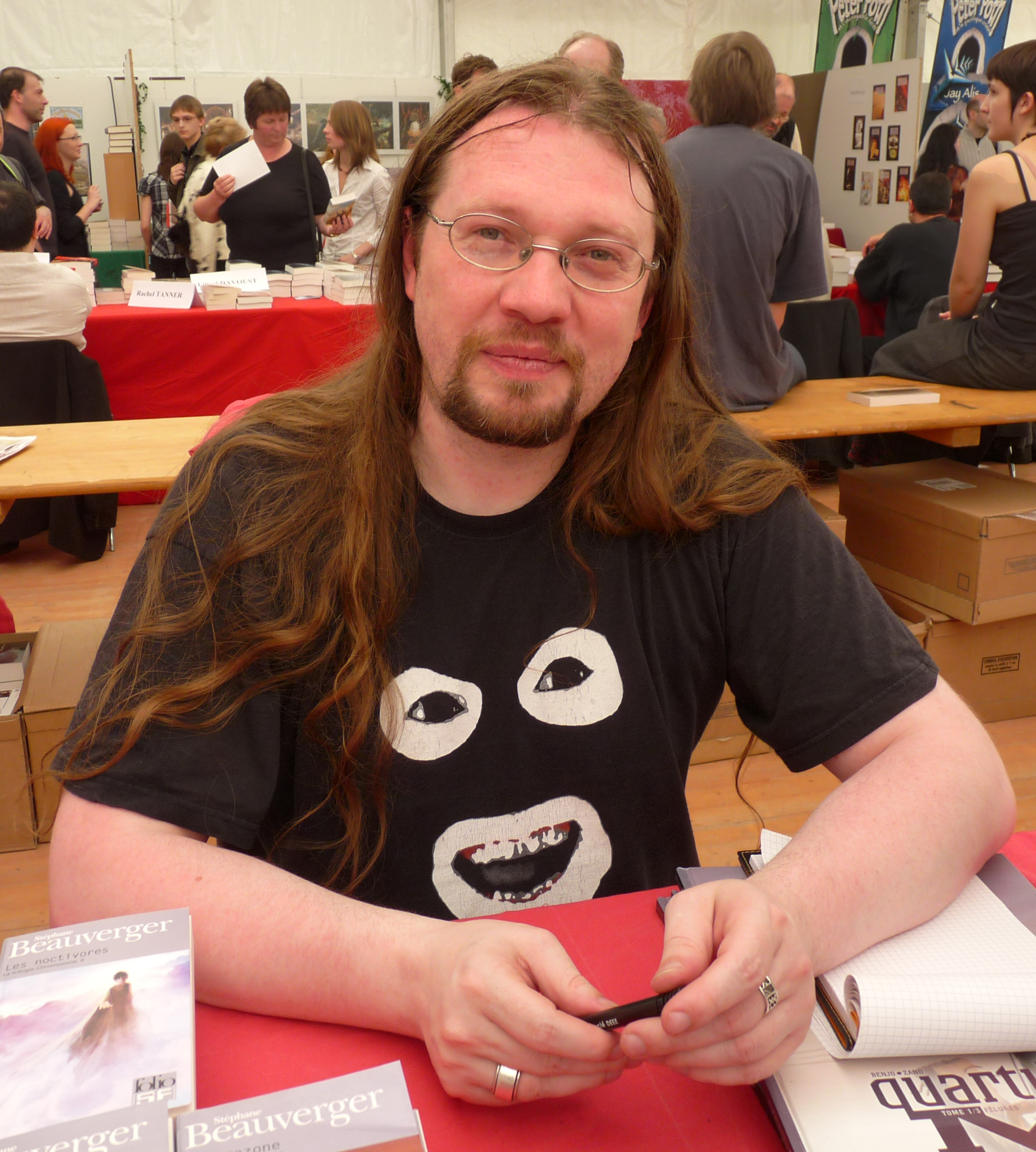 Stéphane Beauverger (Imaginales 2010, Epinal)